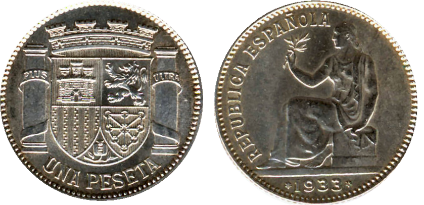 Moneda de una peseta de 1933 circulada en la Segunda Republica Española.